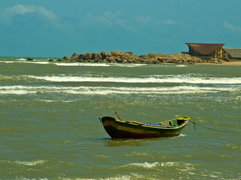 Bem vindos a praia Pedra do Sal. Localizada a 15km de Parnaíba é uma praia caracterizada pelas pedras que ficam ao meio, pela rusticidade e pela forte brisa ocasionada pela curva situada nas pedras.